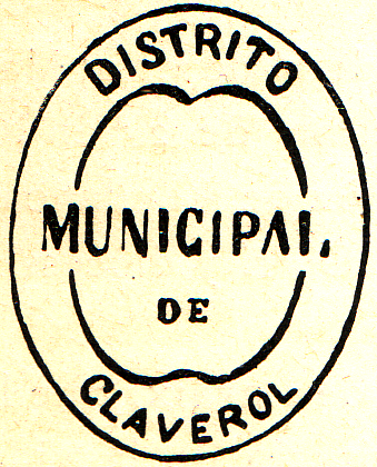 Segell municipal de Claverol vers 1900 (Conca de Dalt, Pallars Jussà)